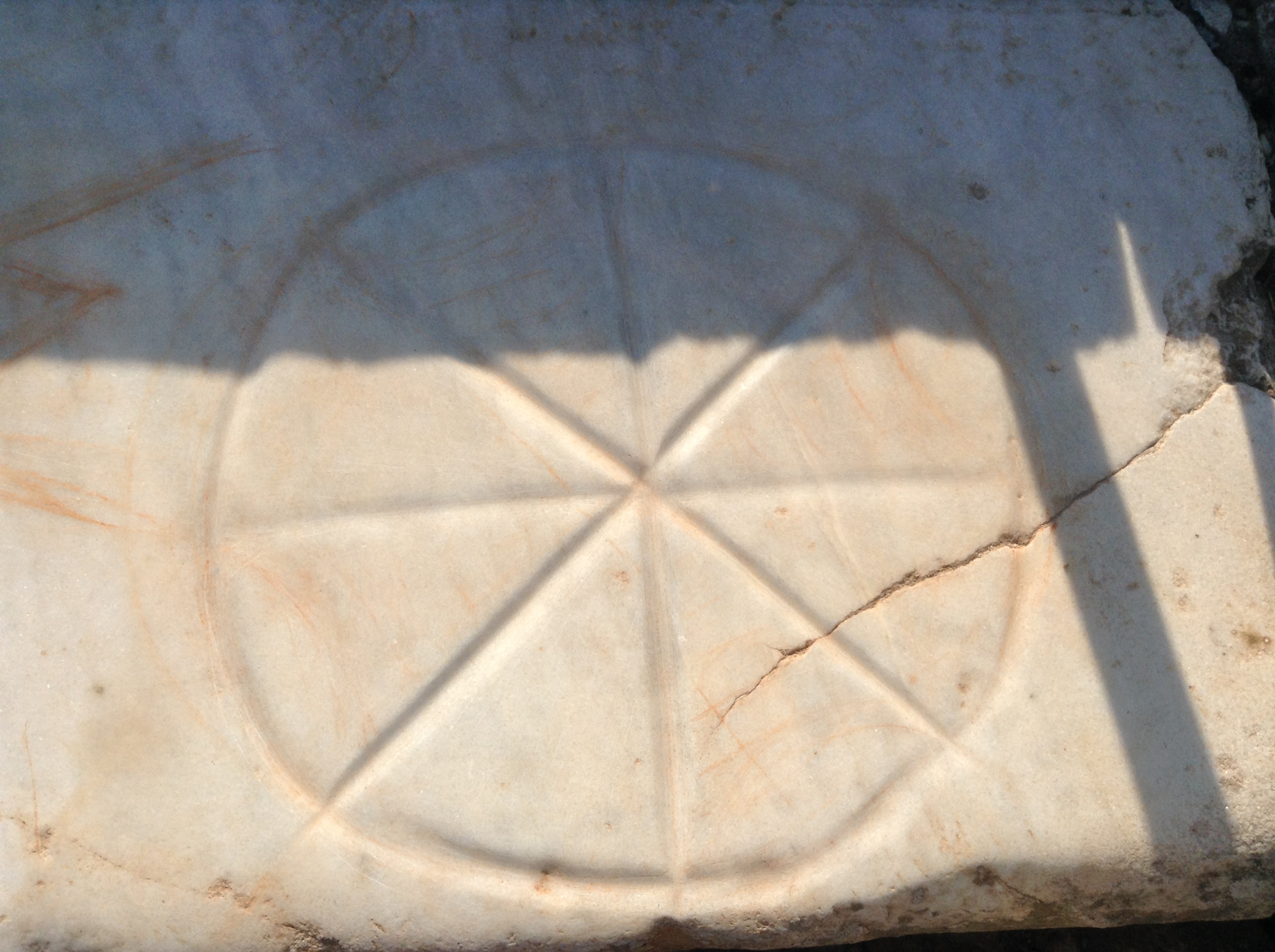 Krzyż słoneczny. Ruiny antycznego miasta Efez.